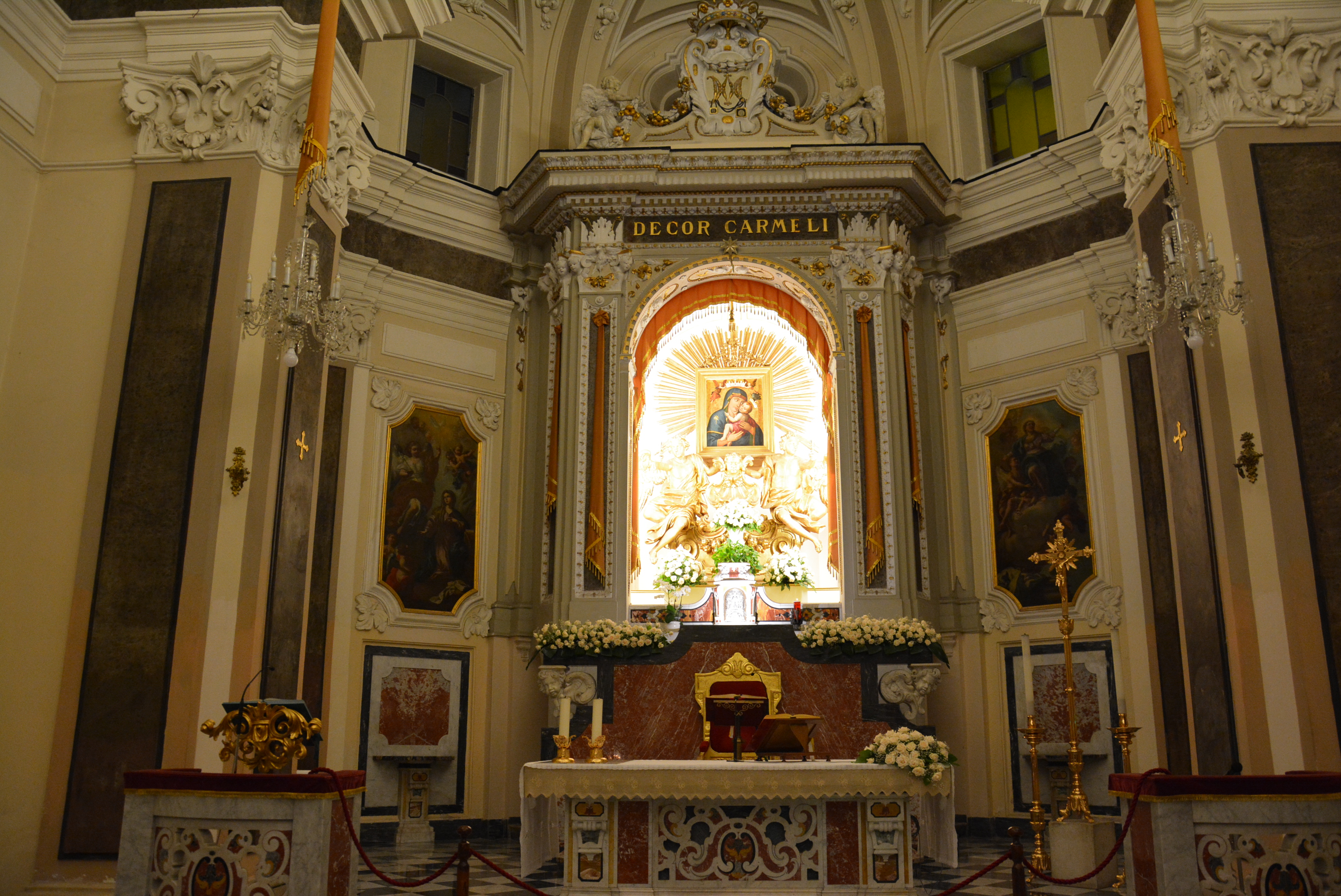 Santuario della Madonna del Carmine a Sorrento